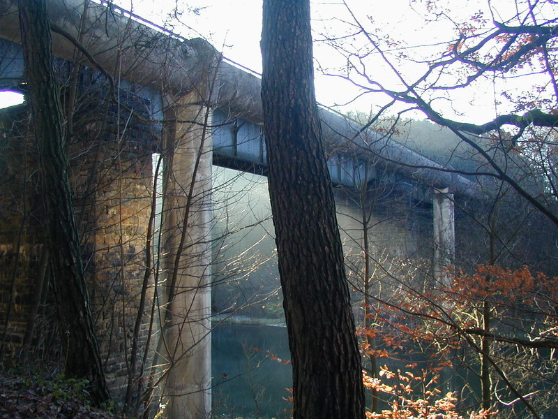 Die Eisenbahnbrücke über die Staustufe Dahlhausen